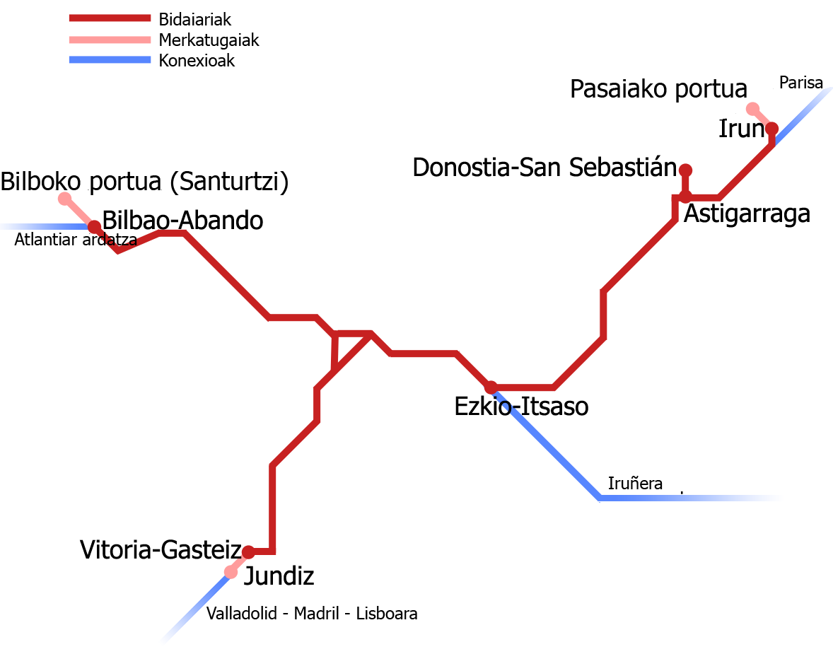 Euskal Y mapa / mapa Y Vasca